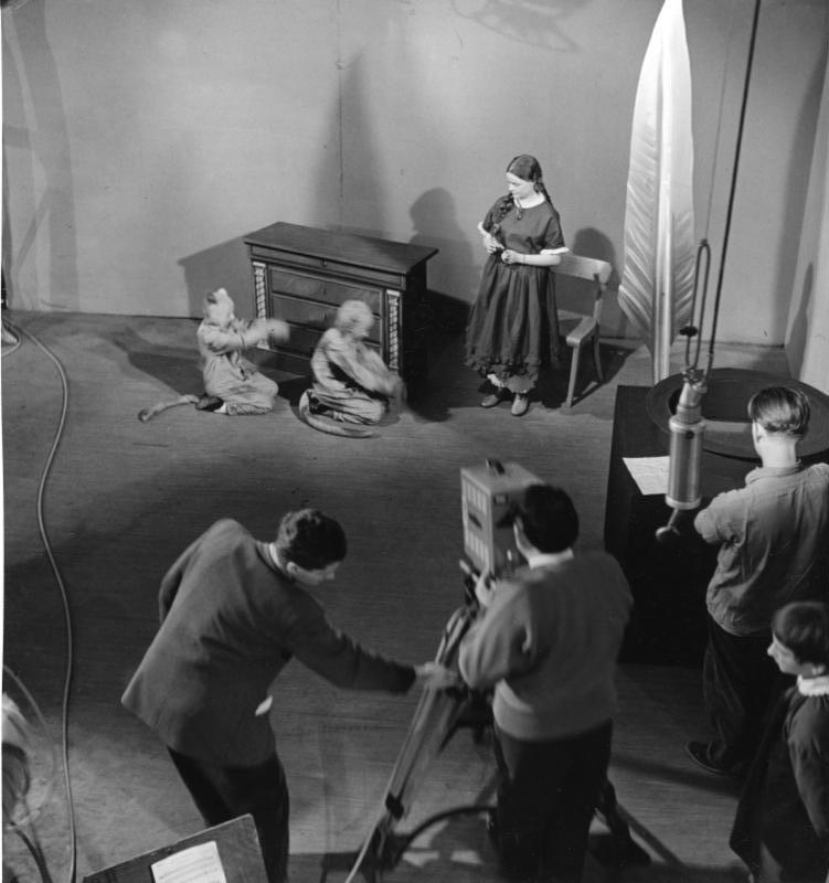 Fernsehstudio Köln Szene aus dem Stück "Der Struwelpeter" von Heinrich Hoffmann während der Originalsendung.